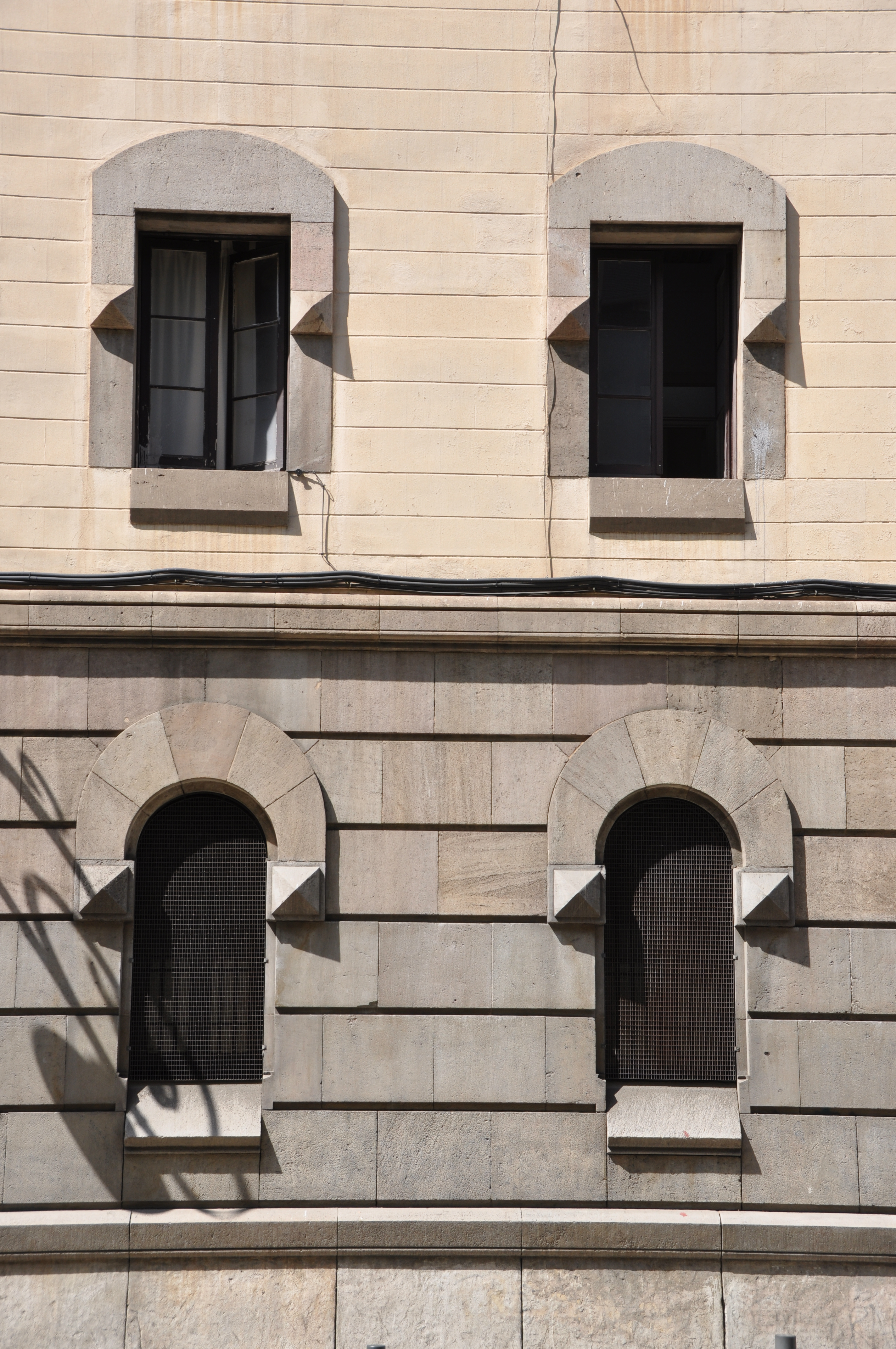 Finestres de la presó Model (carrer Entença) decorades amb puntes de diamant. Carrer Entença